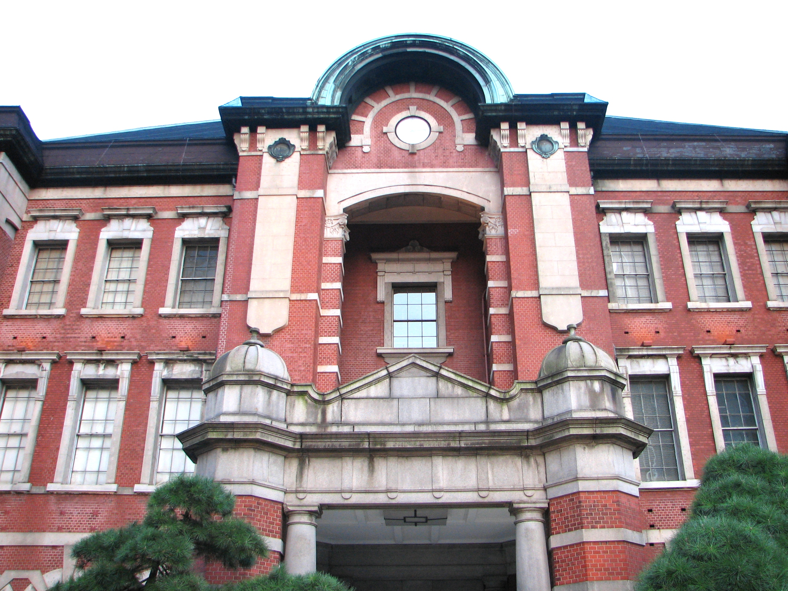 東京駅正面（1914年竣工）